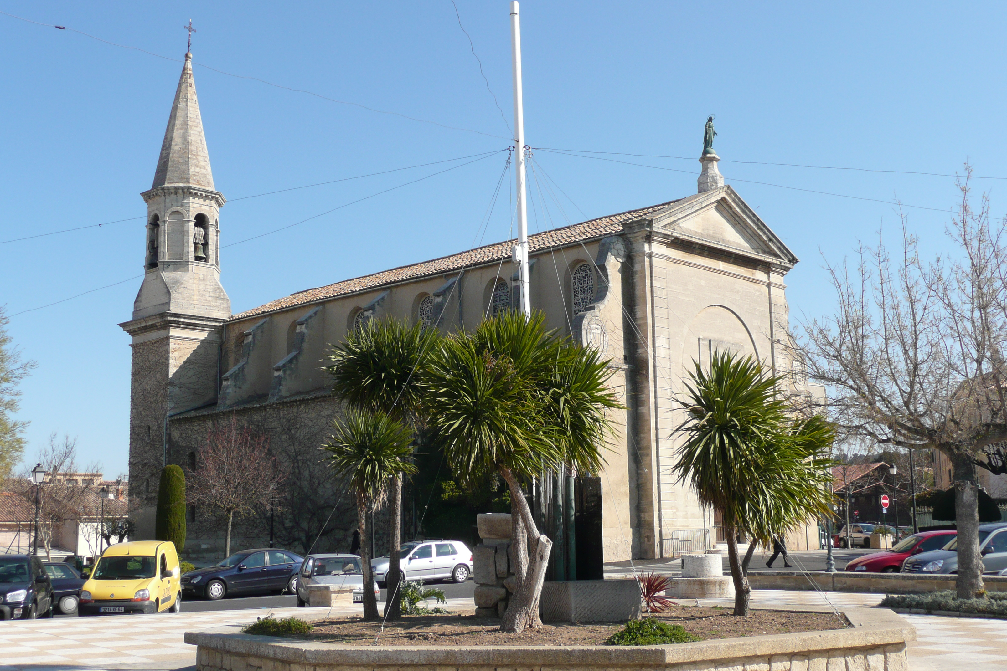 Eglise à Morières lès Avignon.